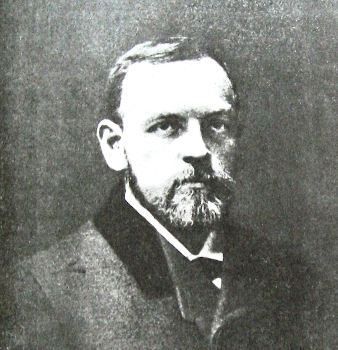 Otto Nordenskjöld